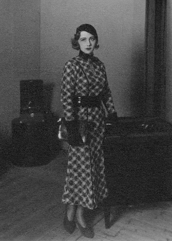 Lena Cederström i Thalias barn på Helsingborgs stadsteater.